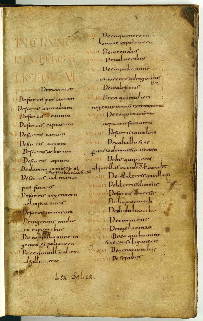 Lex Salica